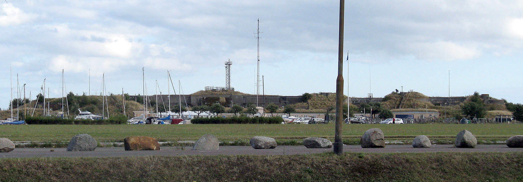 Dragørfortet